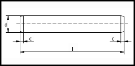 ISO 2338